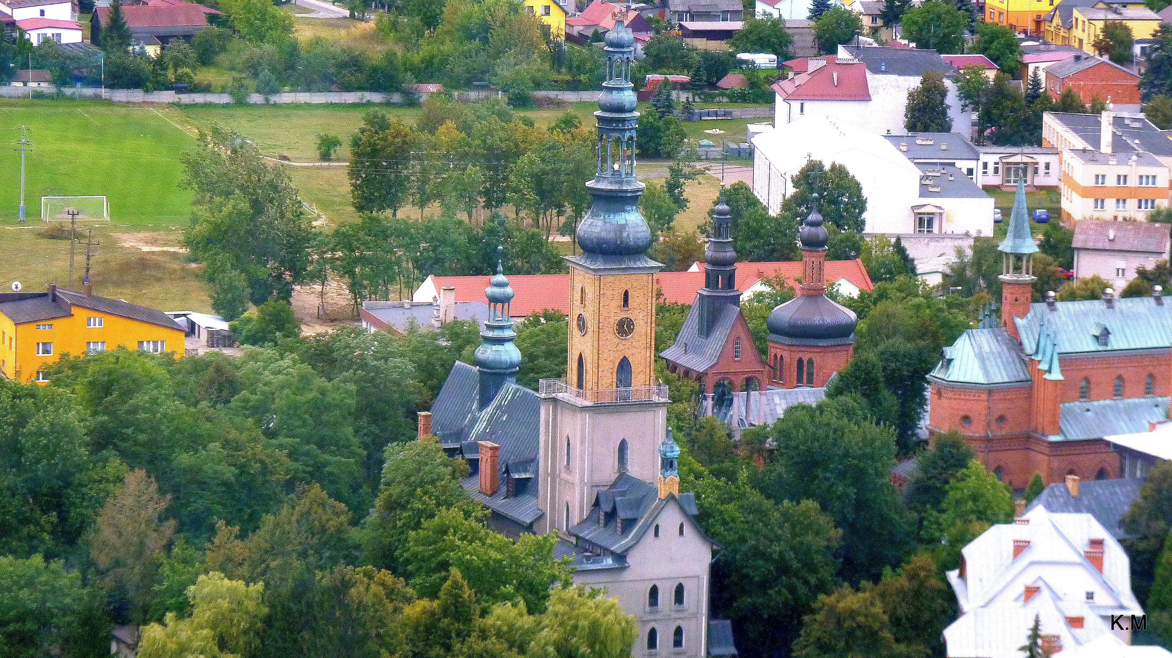 Licheń- Sanktuarium Matki Bożej Licheńskiej. Widok z wieży Bazyliki